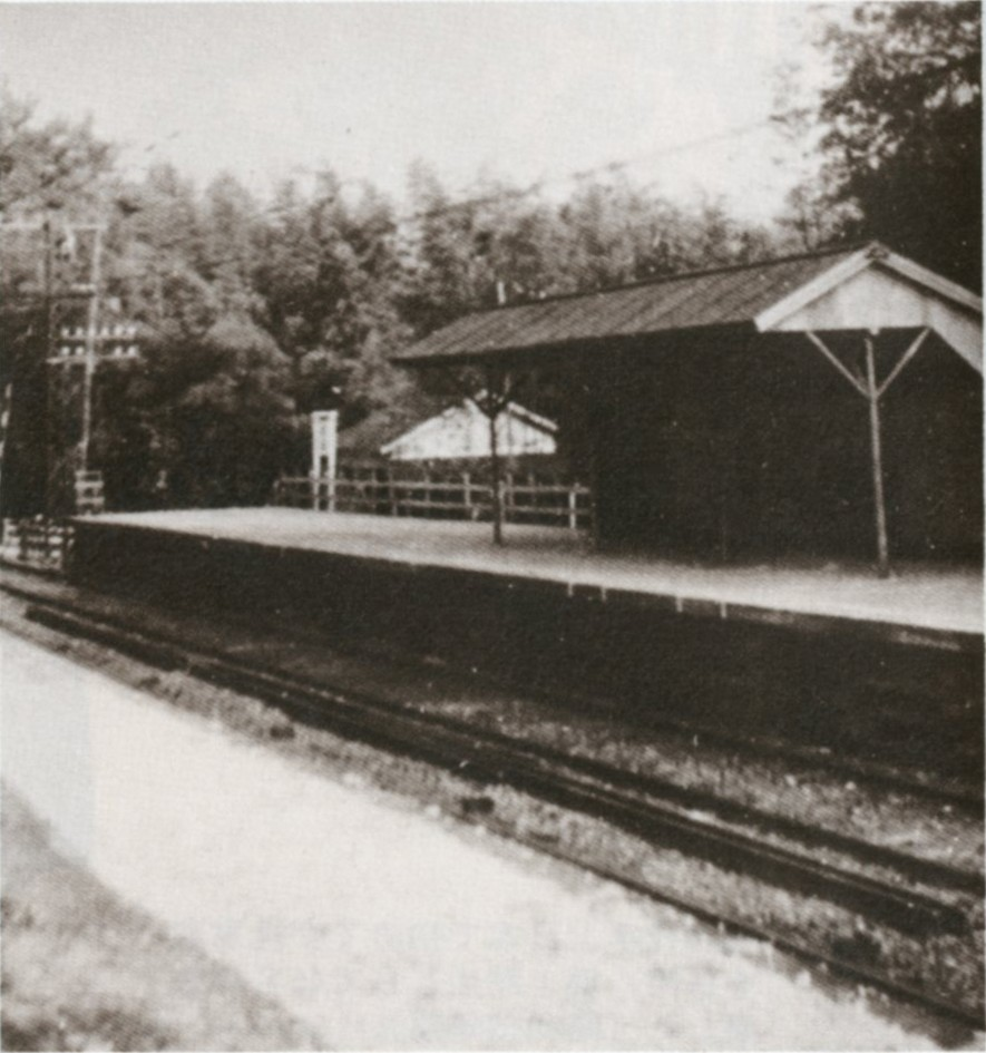 阪急今津線小林～仁川間に設置されていた鹿塩臨時停留場。出典書籍では説明文の後に(昭和18年12月15日)とカッコ書きされているが、もしかすると撮影日が不明なので開業日を書いたのかも知れない。